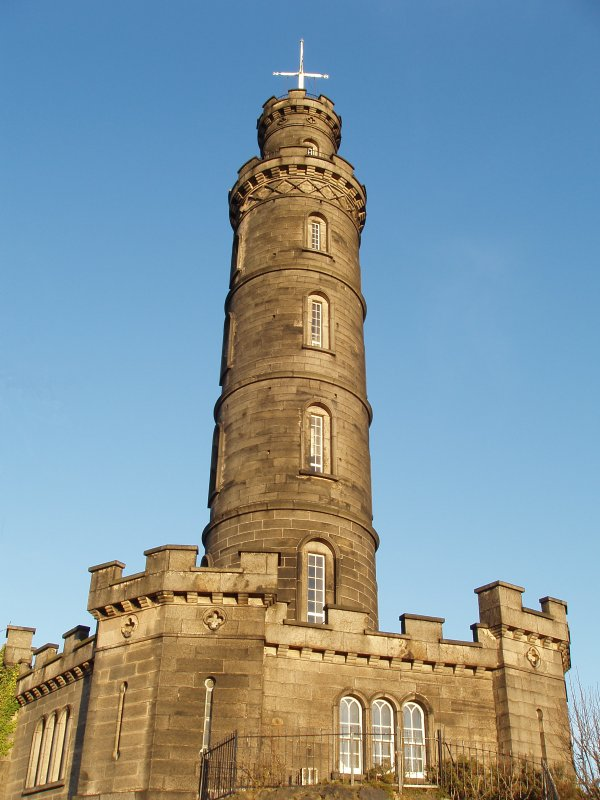 Taken on Calton Hill.